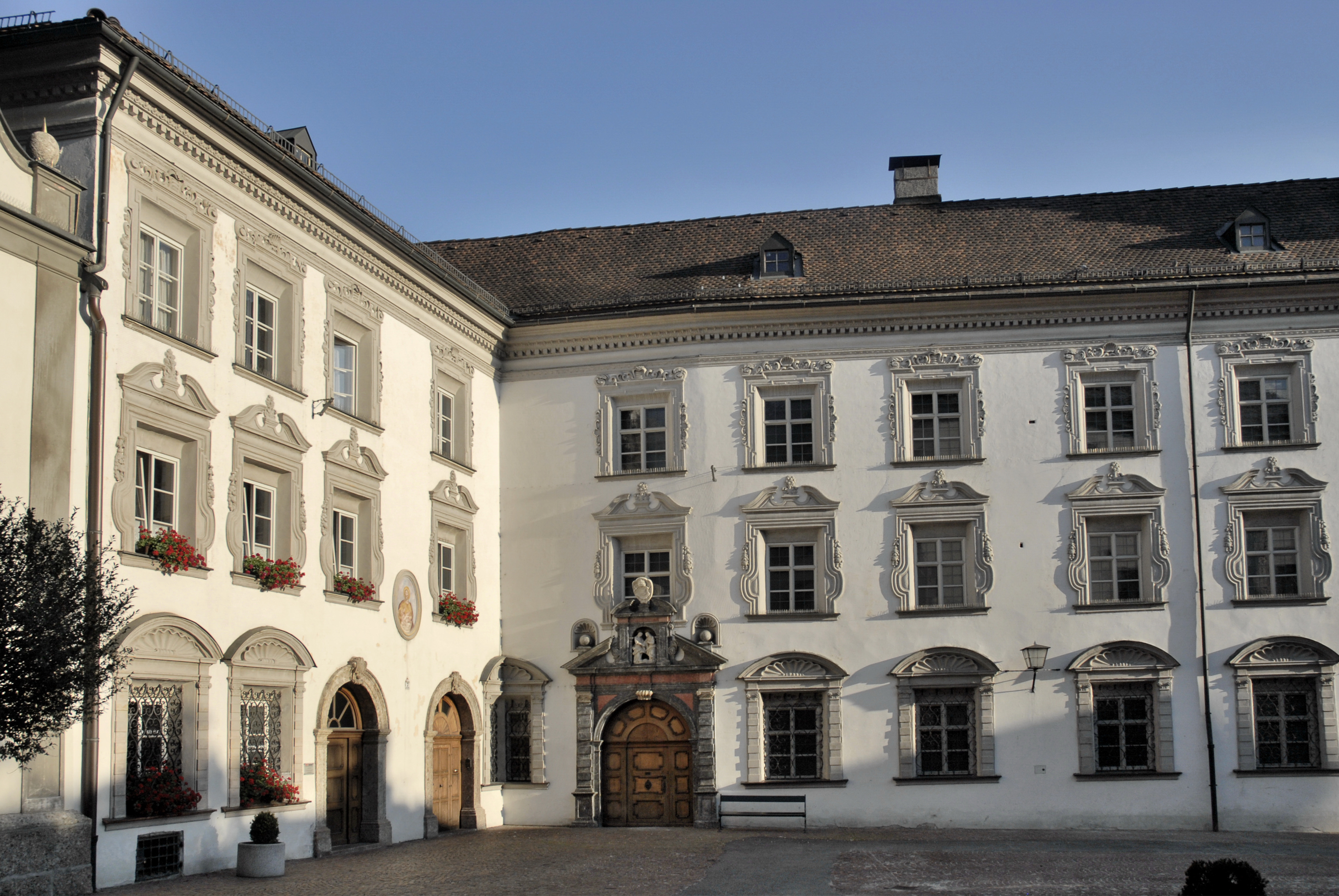 Hall in Tirol, Haus Schulgasse 2, ehemaliges Damenstift, ehemalige Burg Sparberegg